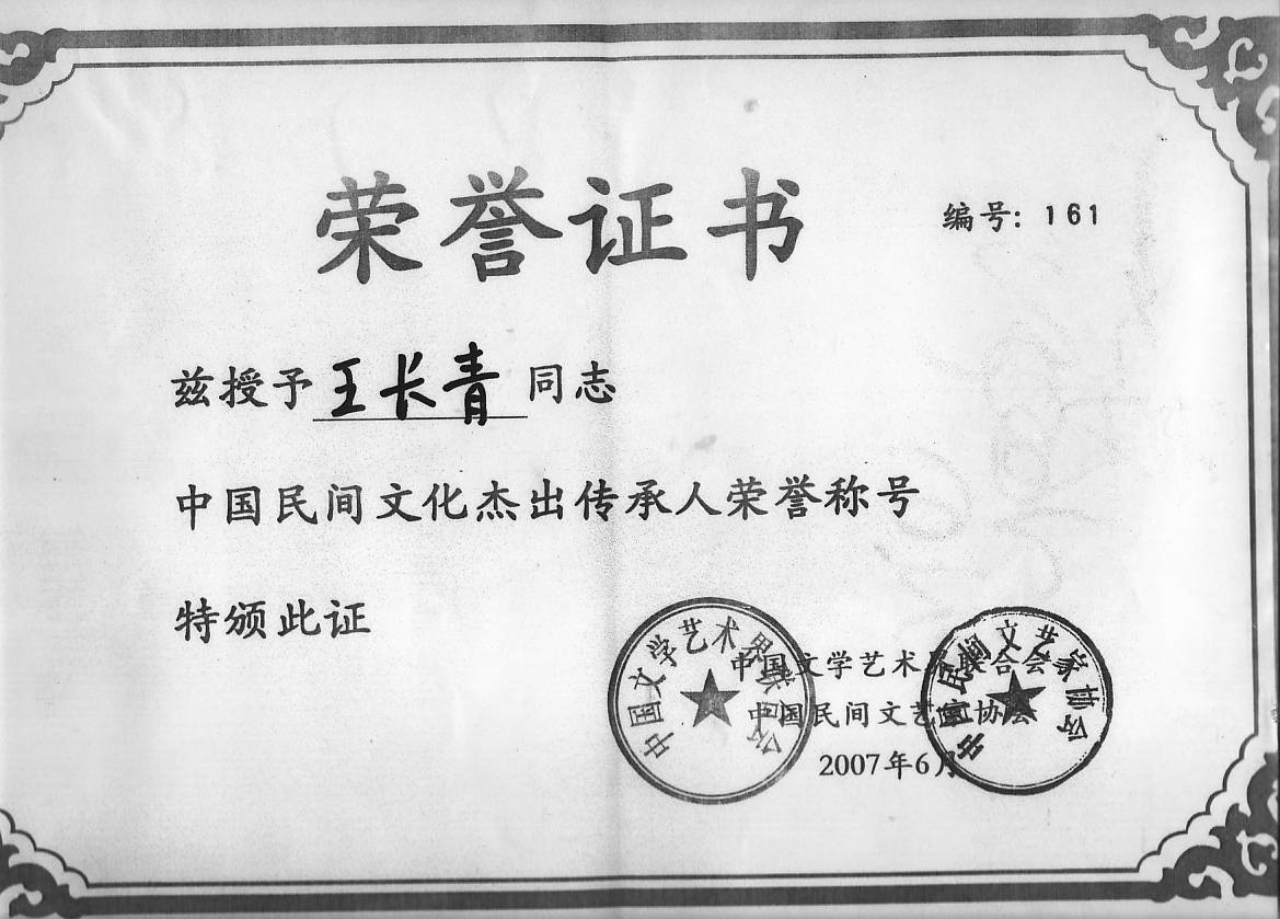 Диплом Ши Дэцяня, выданный ему в 2007 г. Всекитайской Ассоциацией народной культуры и искусства как наиболее яркому представителю китайской культуры, внесшему выдающийся вклад в развитие и сохранение китайских народных традиций (список из 166 человек опубликован 16 декабря 2006 г. ), Ши Дэцянь был назван в числе семи знаменитых мастеров ушу Китая как единственный представитель шаолиньцюань. Он получил титул «Выдающийся хранитель традиций Китая»